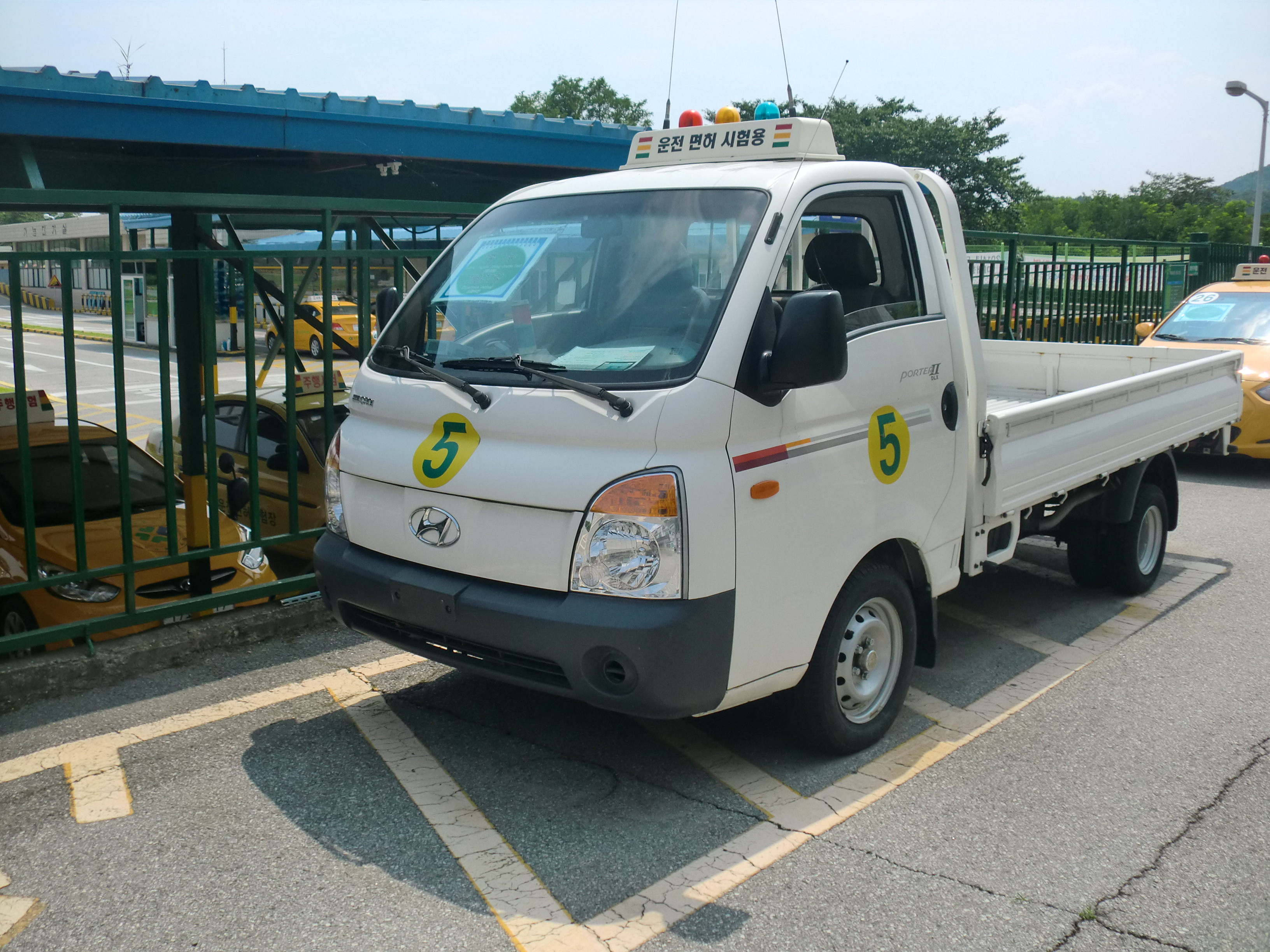 청주운전면허시험장에 있는 현대 포터